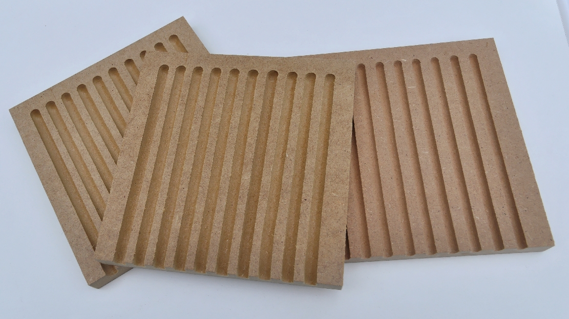 Mauerbienen -modulare Nisthilfe Nistbretter